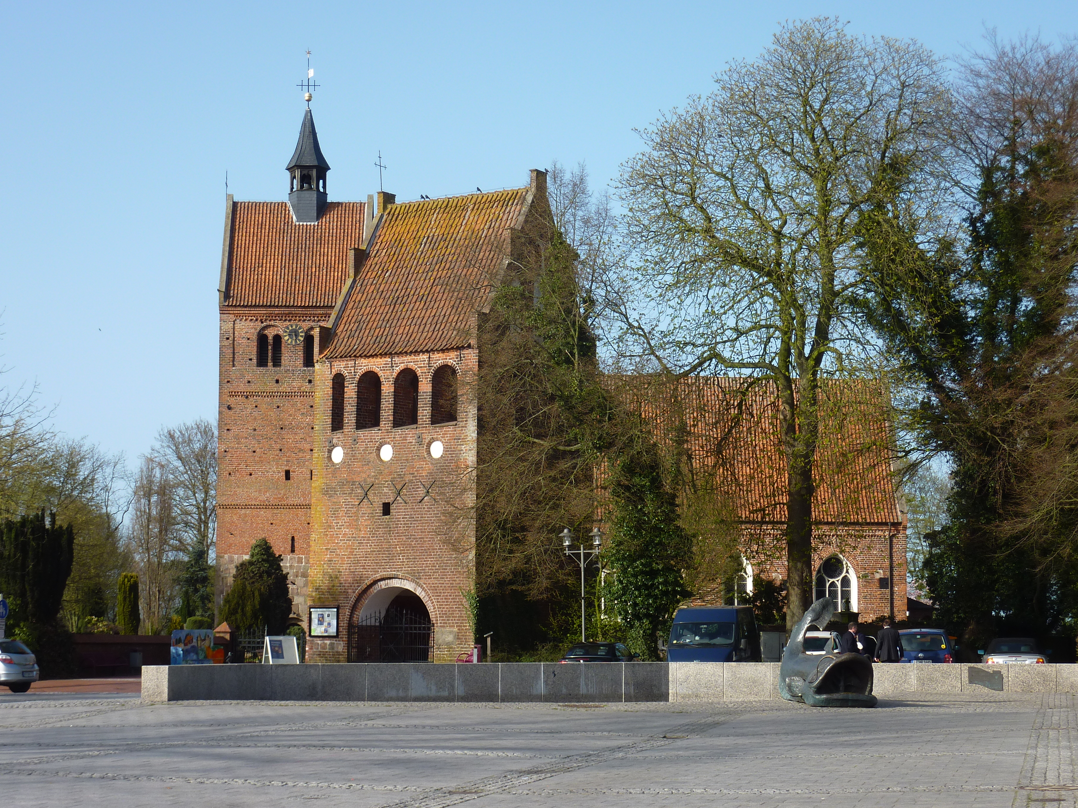 Johanneskirche in Bad Zwischenahn